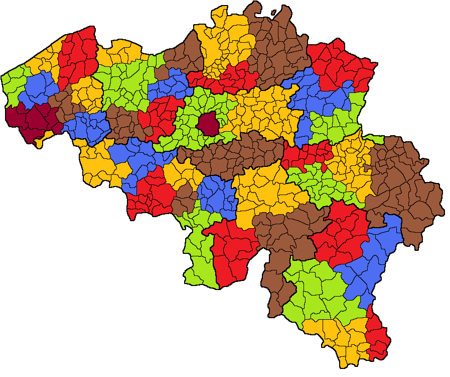 Kaart van België van de bestuurlijke arrondissementen.